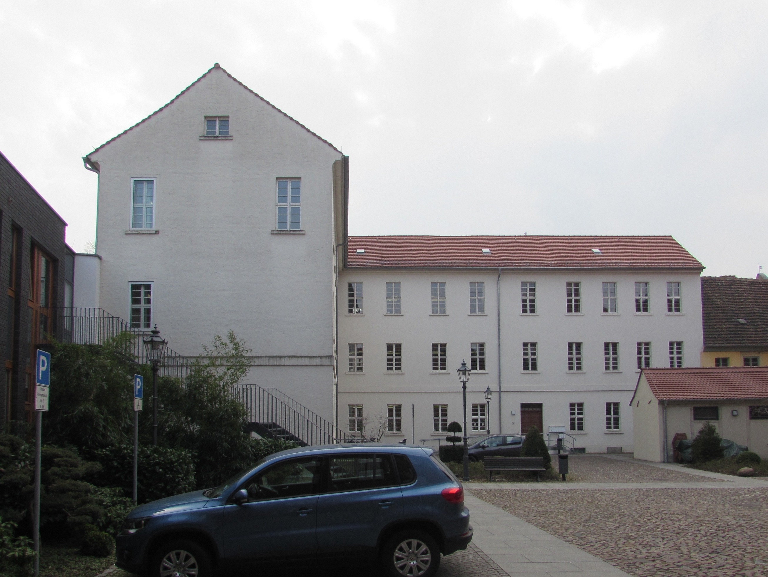 städtisches kraankaanhaus, rückseite Sekretariats- und Syndikatshaus, altstädtischer markt brandenburg